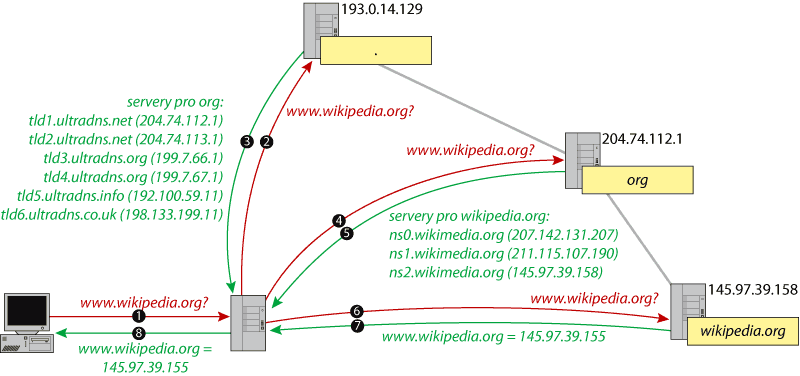 Postup vyhledání v DNS.